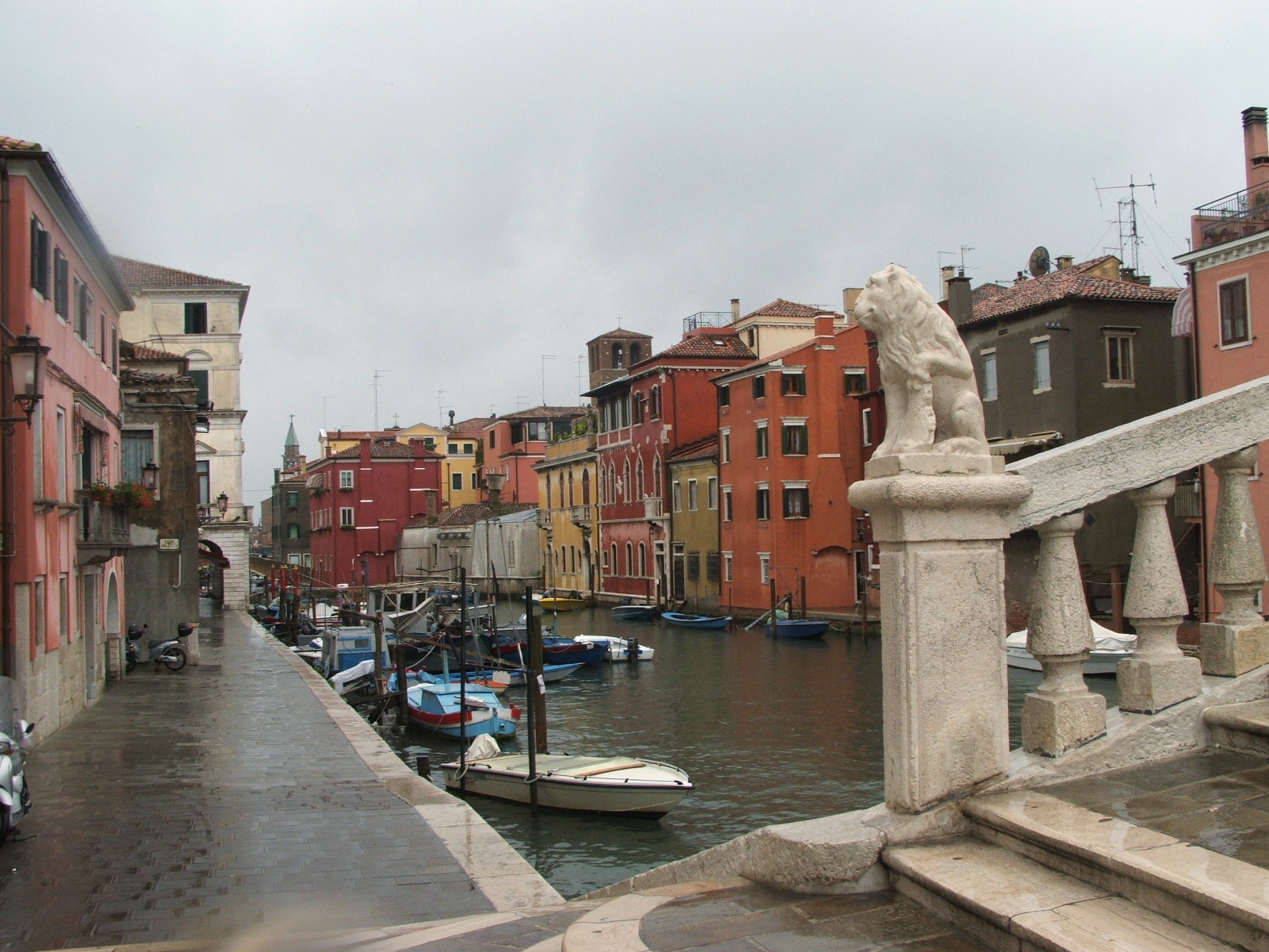 Chioggia, laguna veneta